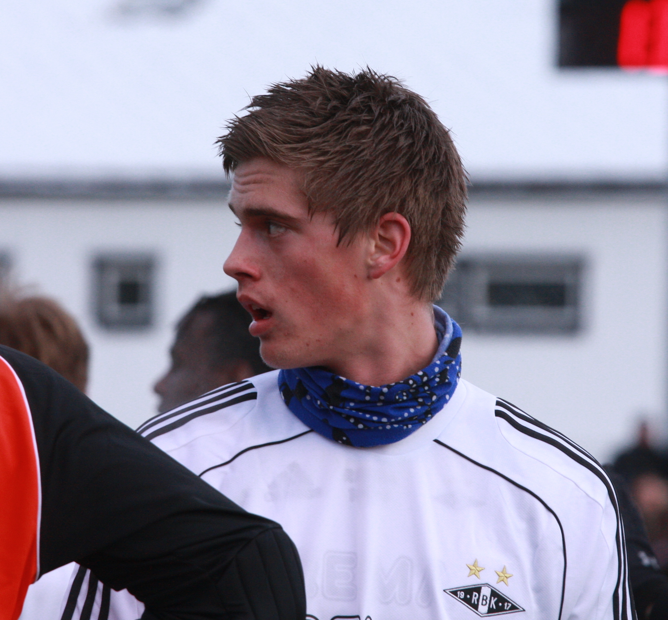 Markus Henriksen